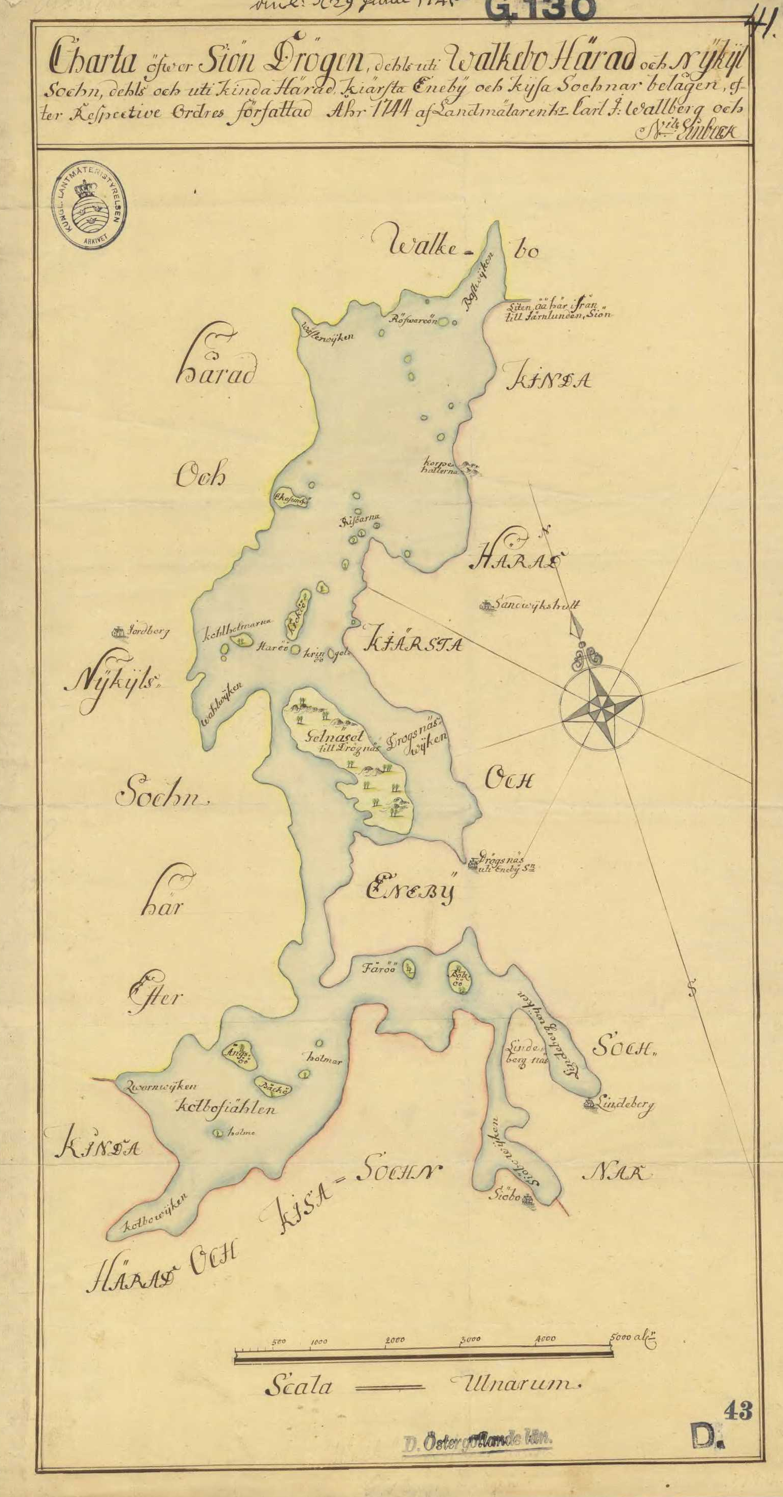 Karta över sjön Drögen av Nils Linbeck.